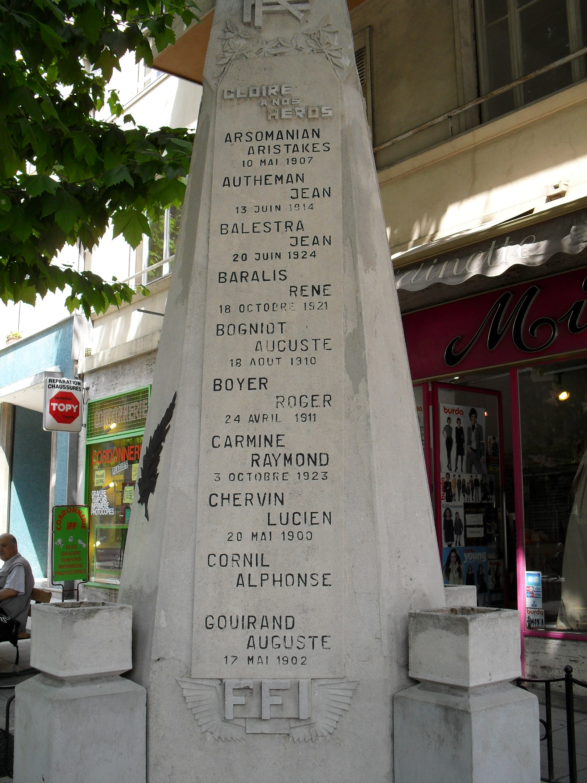 Face FFI du cénotaphe commémorant la Libération de Nice situé à l'angle du carrefour du 28 août et du boulevard Joseph Garnier. On peut y lire les noms des 10 FFI décédés dans les combats autour du carrefour le 28 août 1944.